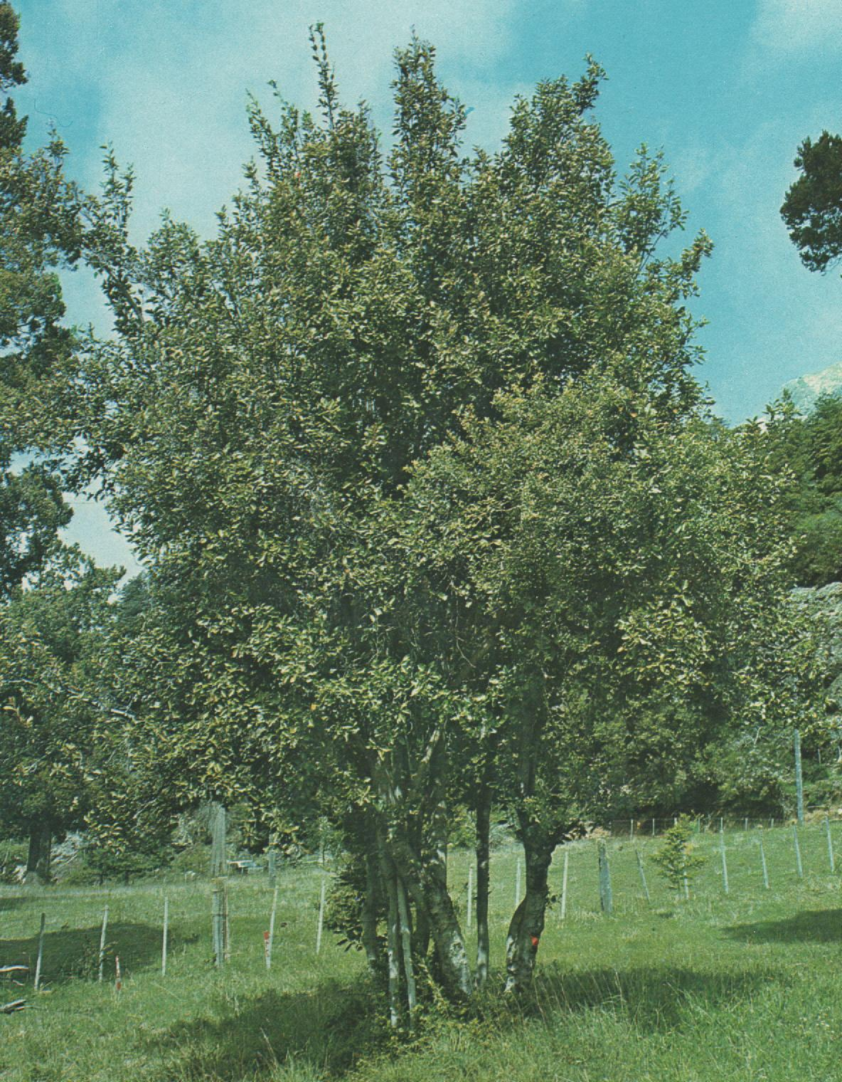 Ejemplar de Lomatia hirsuta, en Argentina.